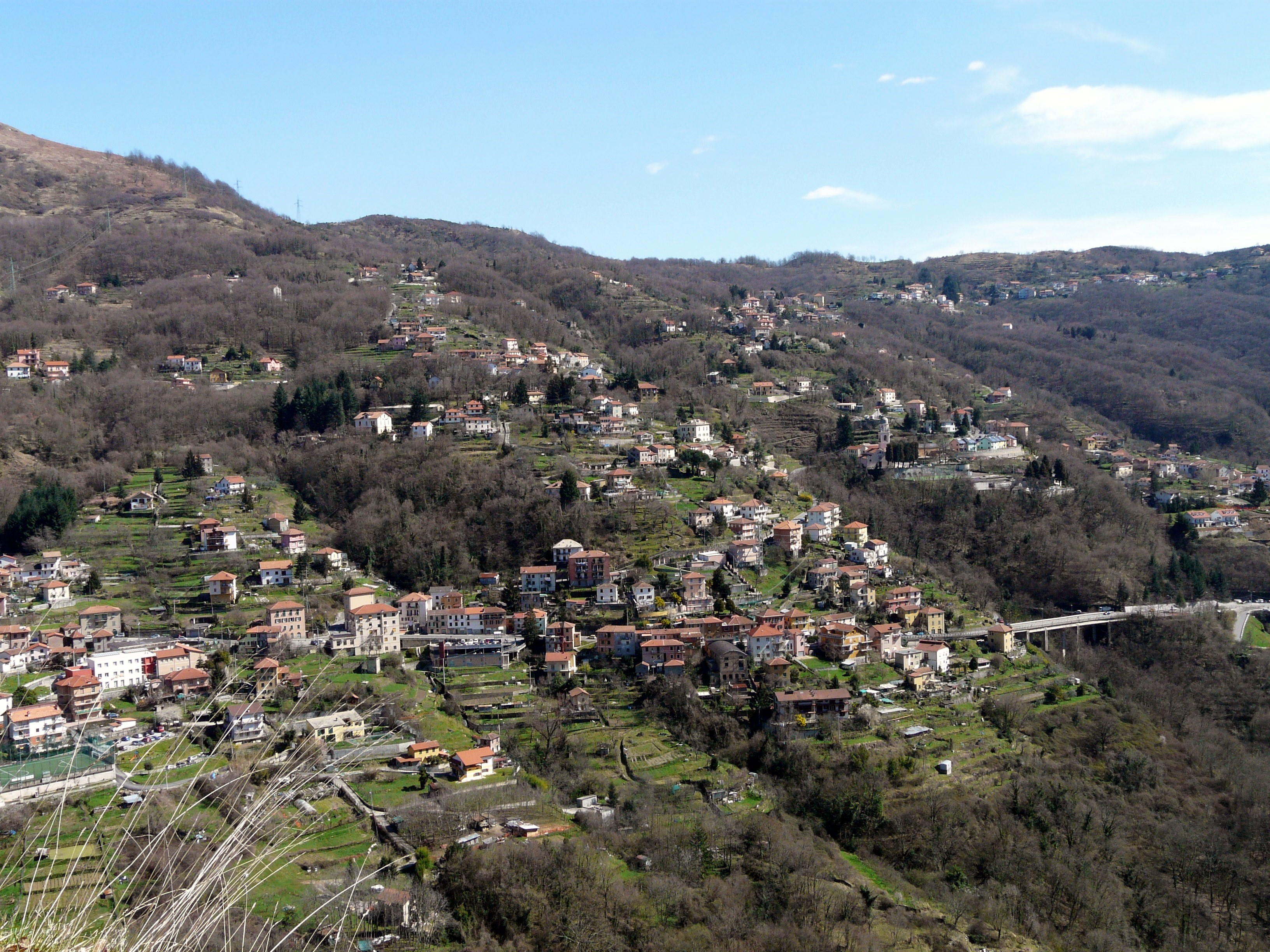 Panorama di Bargagli dalla frazione di Moranego, Davagna, Liguria, Italia